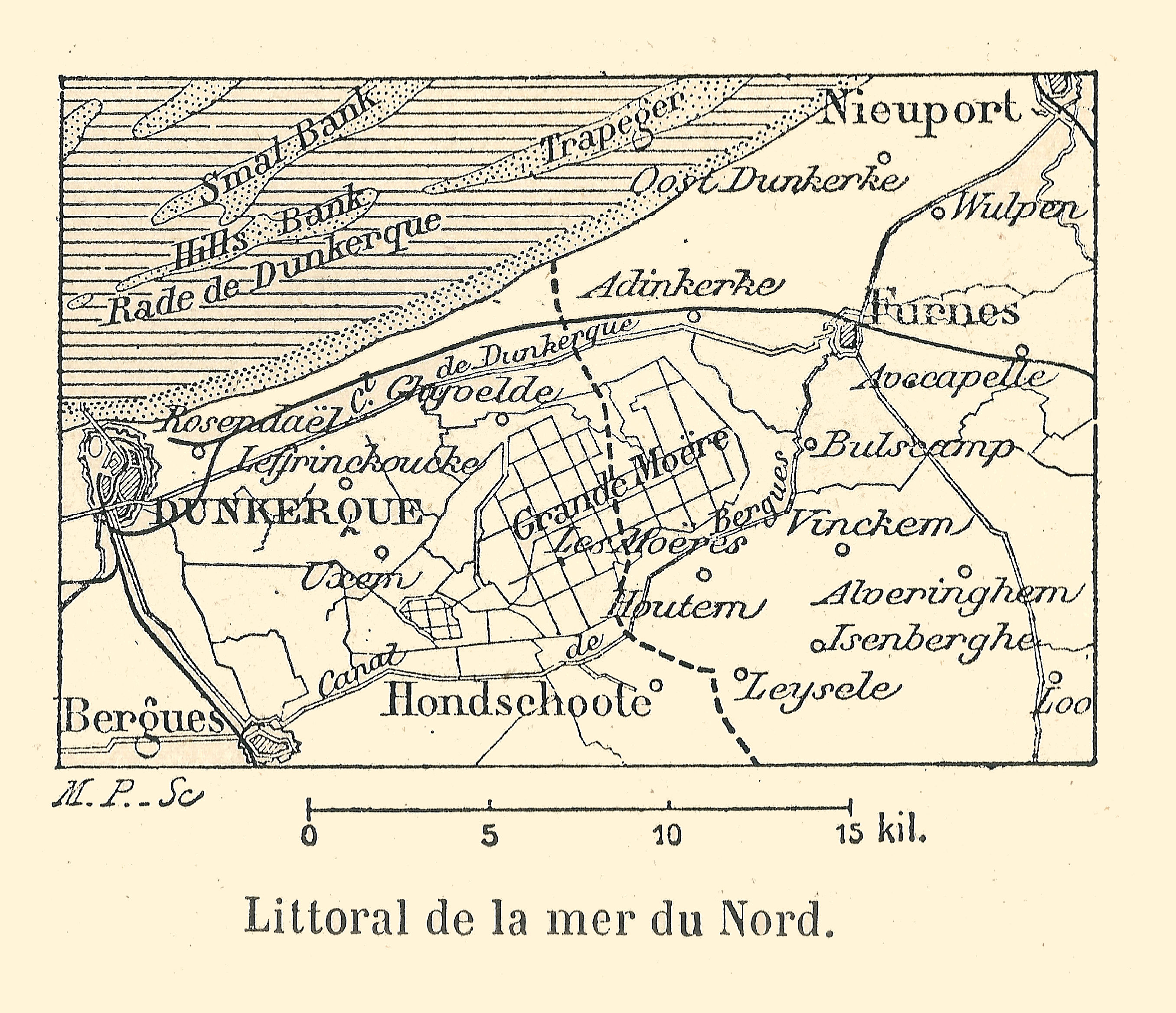 Carte de Franz Schrader